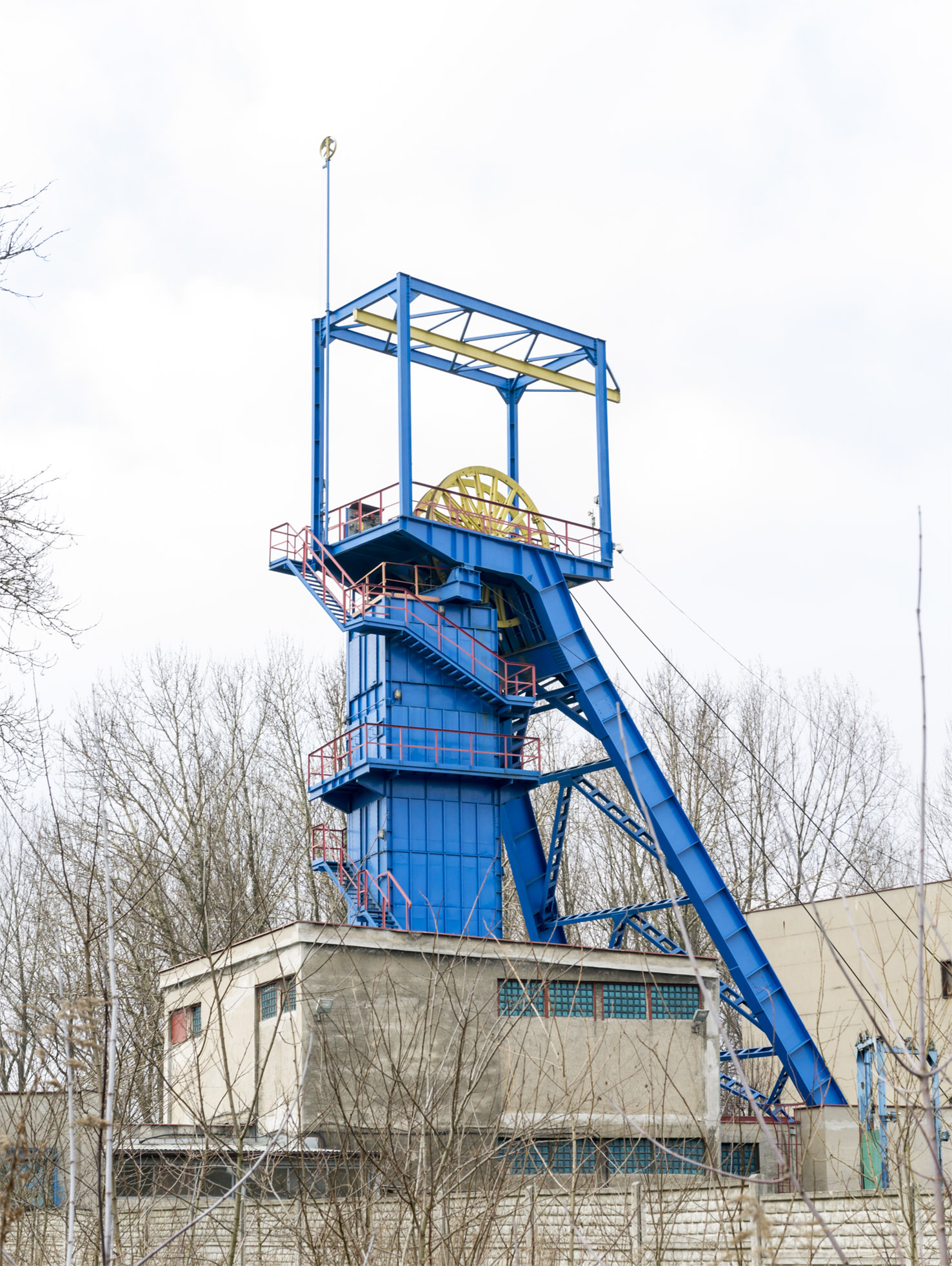 Wetterschacht des Bergwerks Rozbark (Heinitzgrube). 2014 durch das Bergwerk Piekary genutzt.